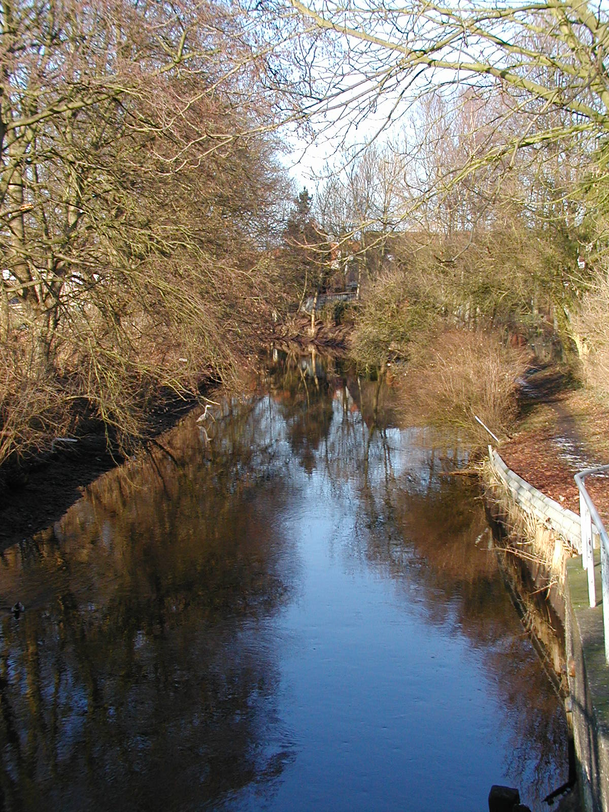 Der Neuhaus Bülkauer Kanal in Neuhaus (man(n) beachte den Graureiher in mitten der Stadt)